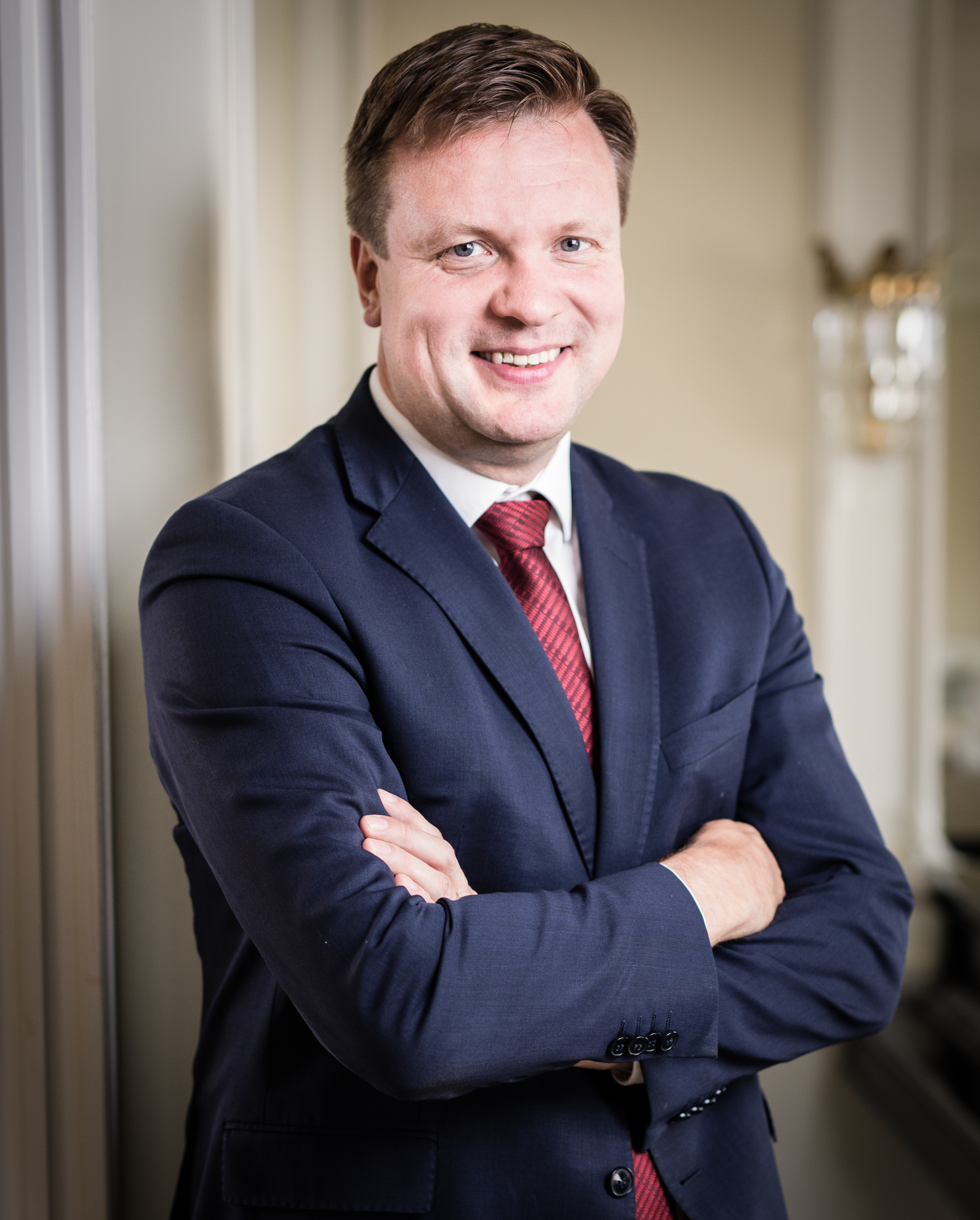 Kehitysyhteistyö- ja ulkomaankauppaministeri Ville Skinnari virallisessa valokuvassa. Kuva Valtioneuvoston kuvapankista.